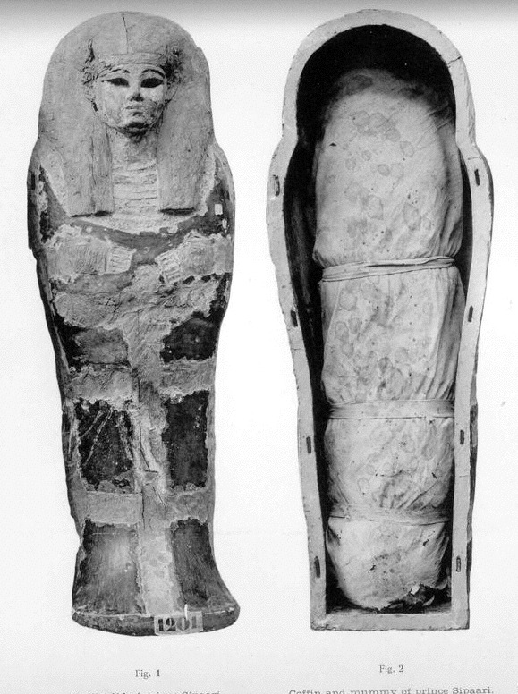 Cercueil et momie du prince Sapaïr (fin XVIIe dynastie) - Catalogue général des Antiquités égyptiennes du Musée du Caire : The Royal Mummies, 1912